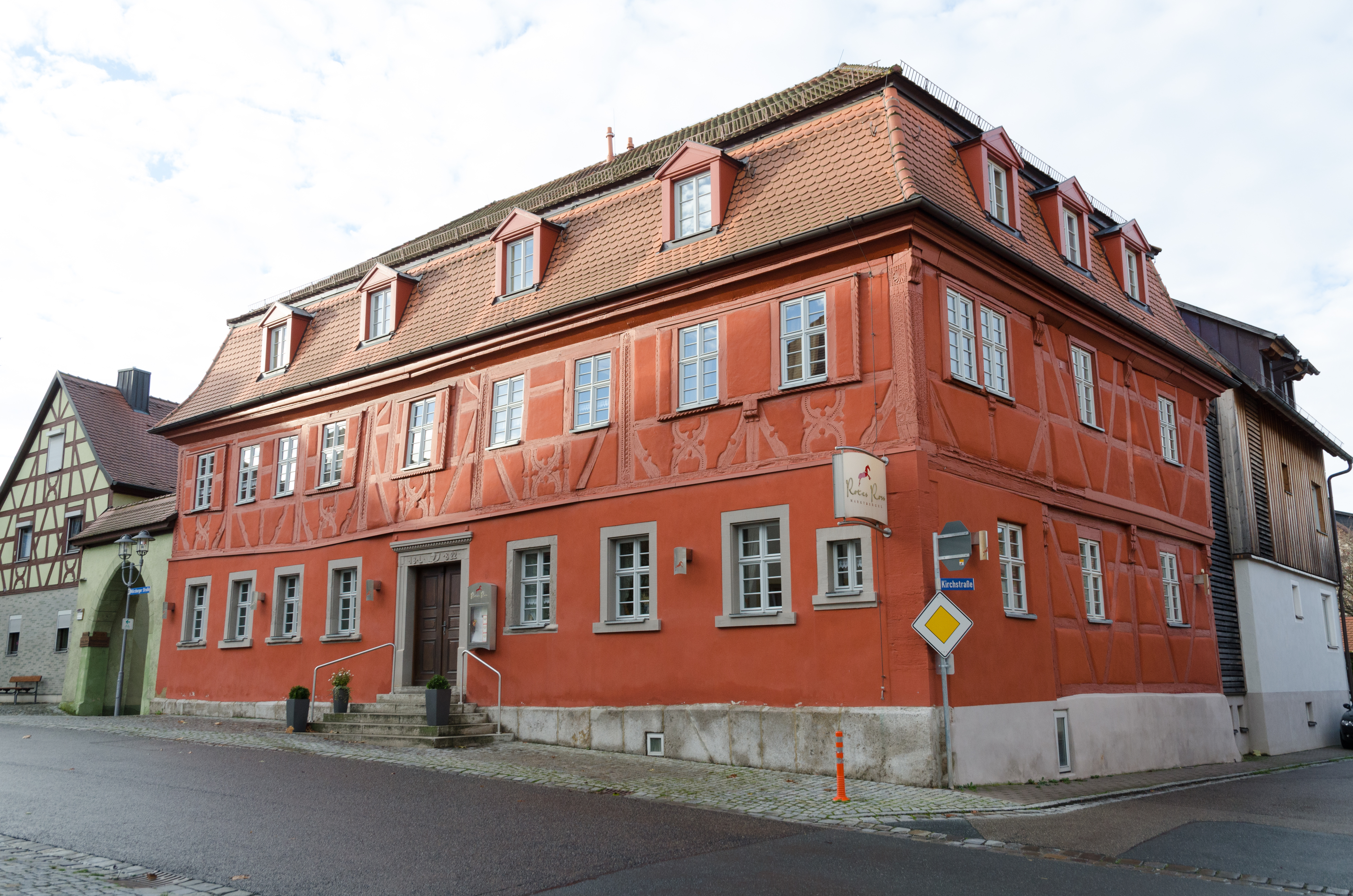 Marktbergel, Würzburger Straße 1